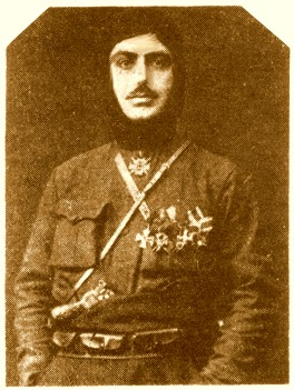 Гарегин Нжде